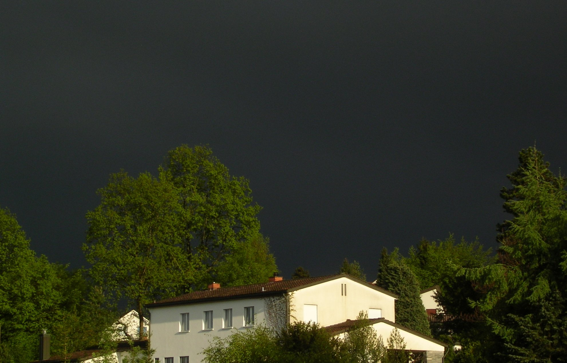 (en) (de) Vor einem Gewitter. Der Himmel war so dunkel, wie ich es noch nie gesehen habe. Beinahe unglaublich, dass die Sonne trotzdem geschienen hat. Aufnahmeort: Schweiz Bearbeitung: GIMP Zugeschnitten